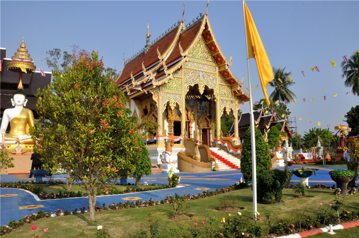 ภาพถ่ายบริเวณหน้าวิหารวัดสันปูเลยสะหลีเวียงแก้ว